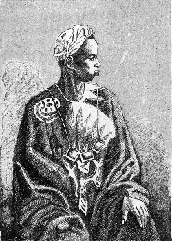 Un griot en habit de fête (Sénégal) - illustration de Côte occidentale d'Afrique du Colonel Frey, 1890) [Fig.84 p.131 :] [Cote : Réserve A 200 386]